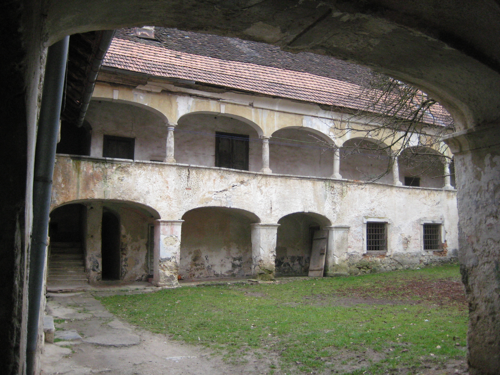 Trebnje castle, Slovenia